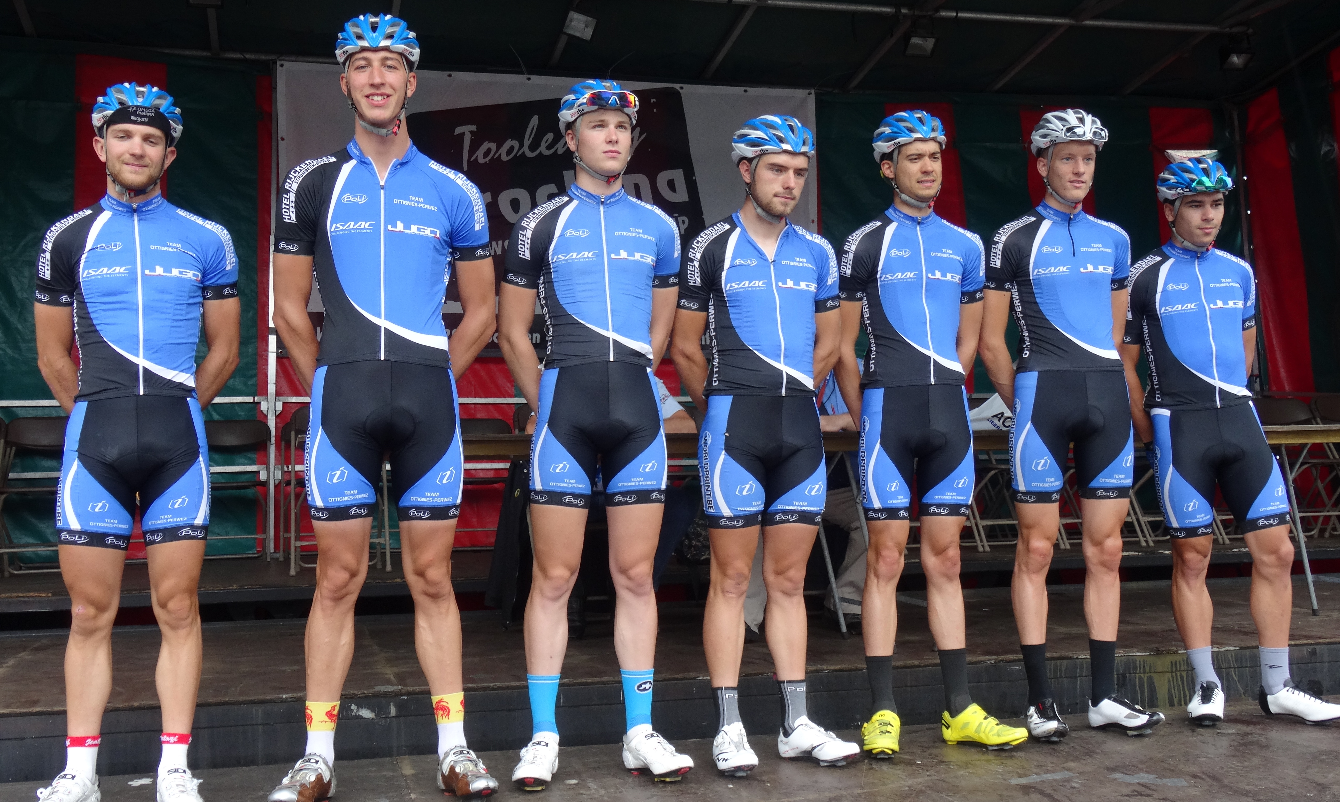 Reportage photographique réalisé le dimanche 10 août à l'occasion du départ et de l'arrivée de la Flèche du port d'Anvers 2014 à Merksem (Anvers), Belgique.